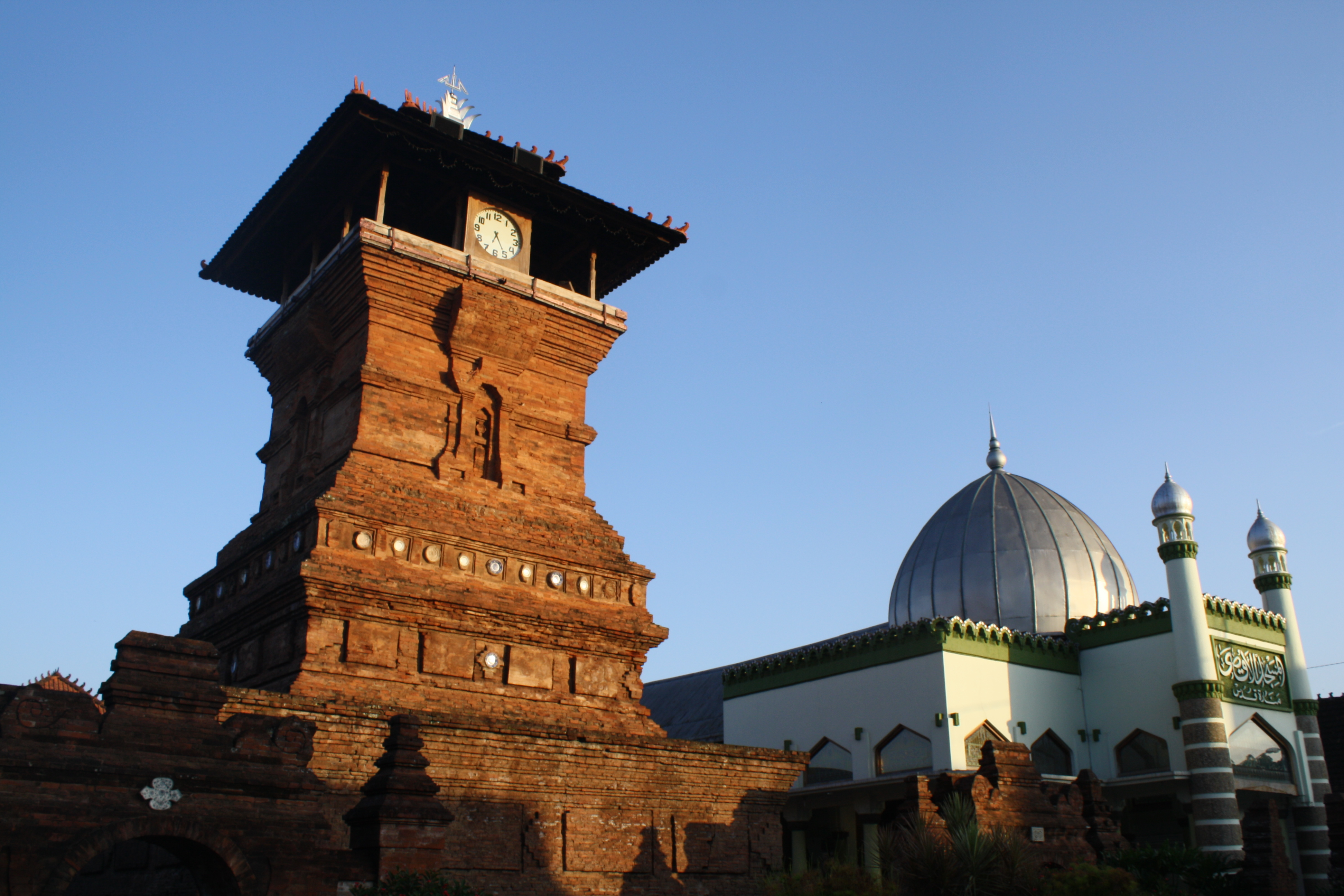 Masjid Menara Kudus Jawa Tengah Indonesia